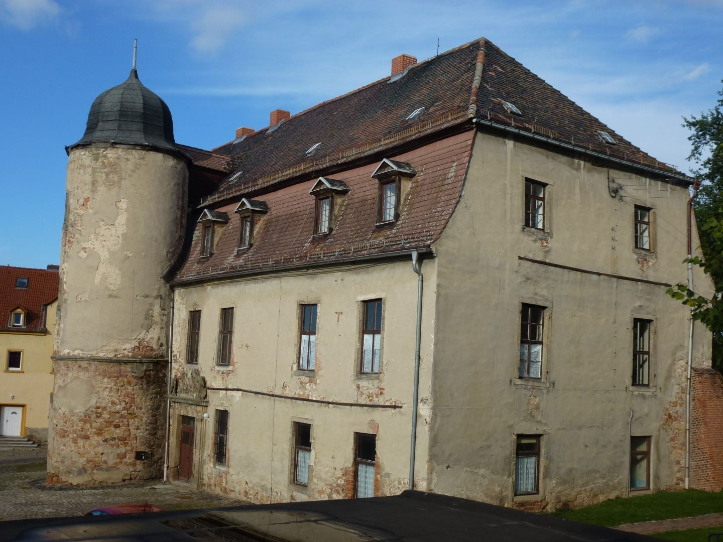 Herrenhaus in Gröbitz